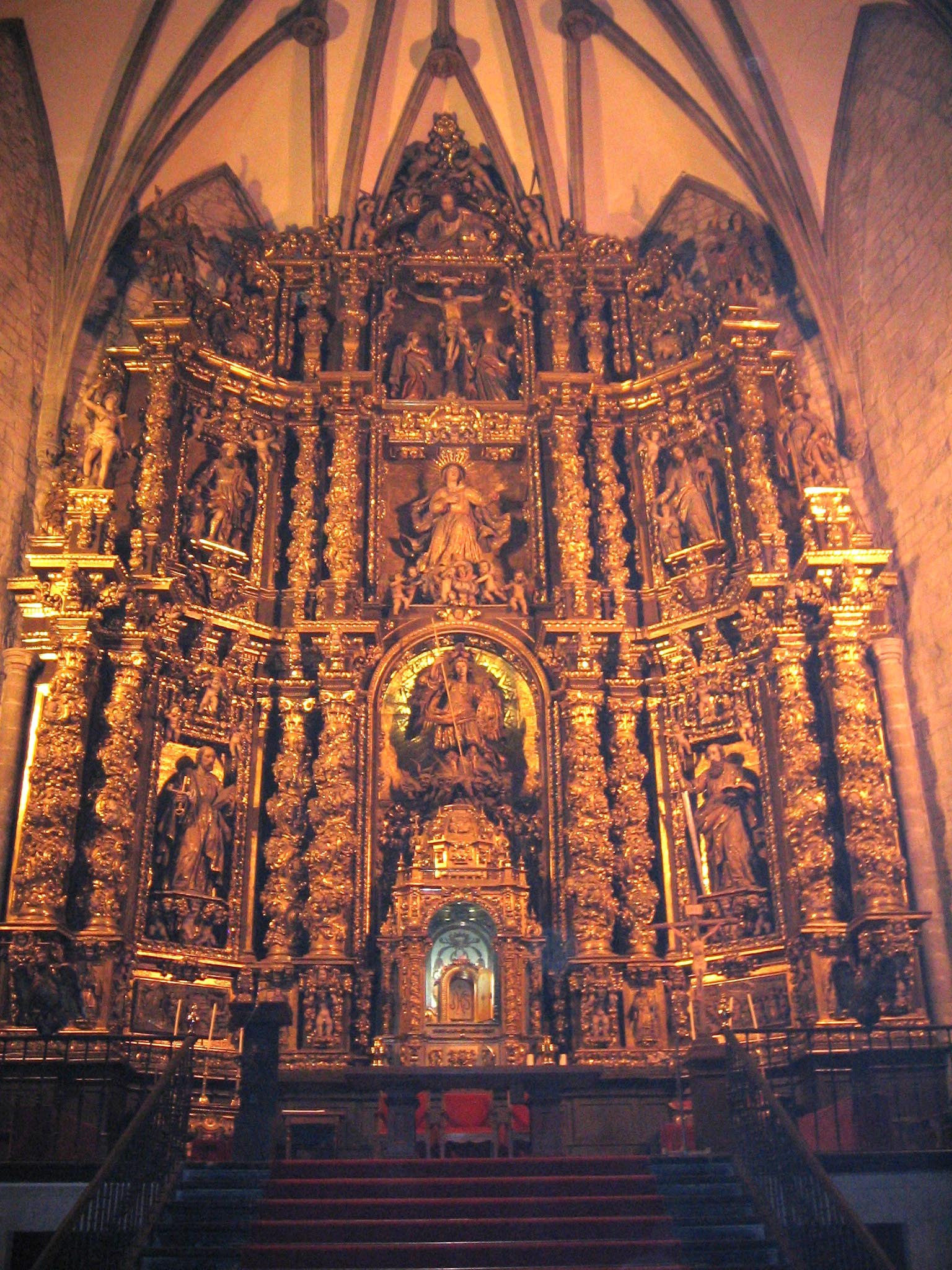 Altar mayor de la iglesia de San Miguel de Oñate (Guipúzcoa) País Vasco (España).